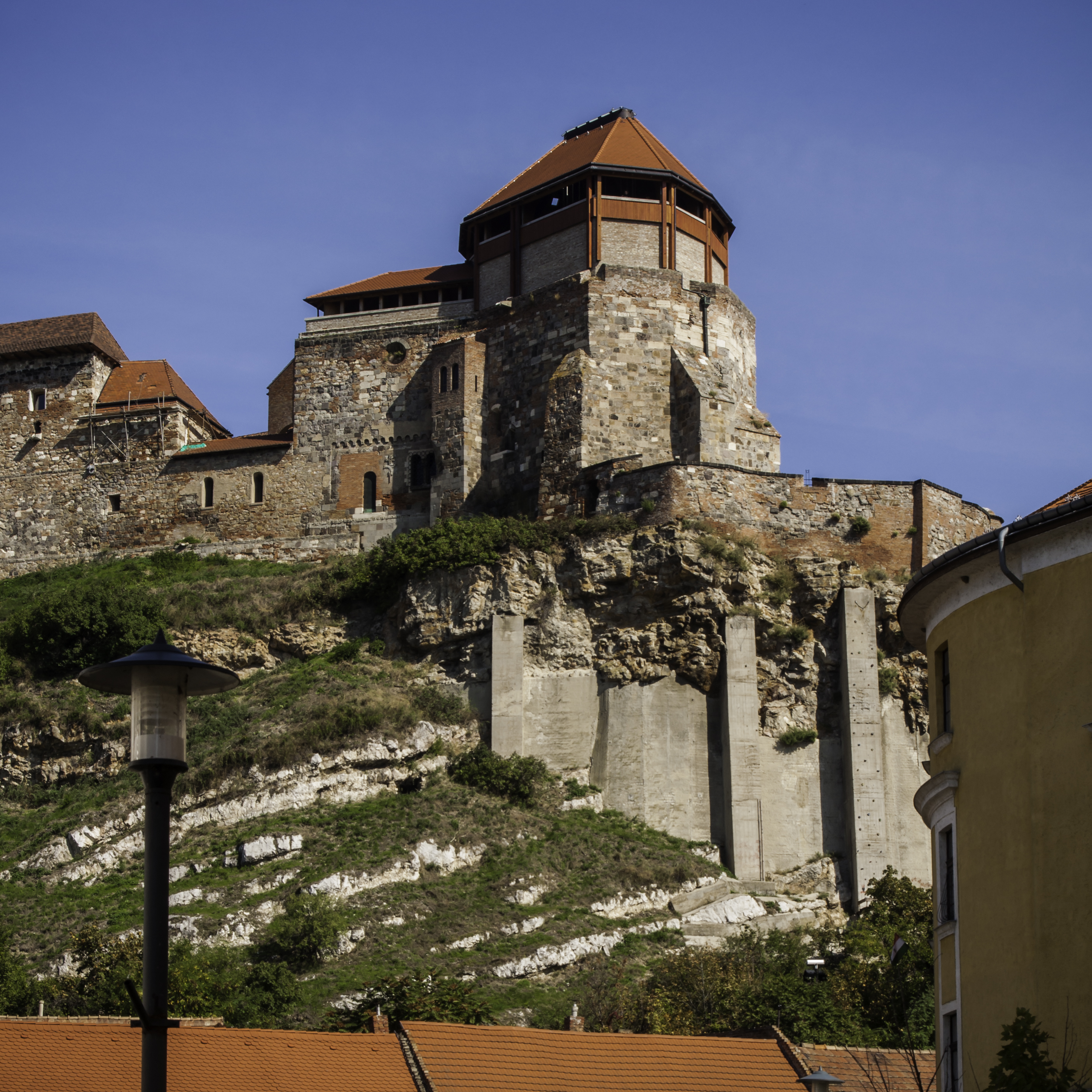 vár, a királyi, majd érseki palota maradványainak együttese This is a photo of a monument in Hungary. Identifier: 91100